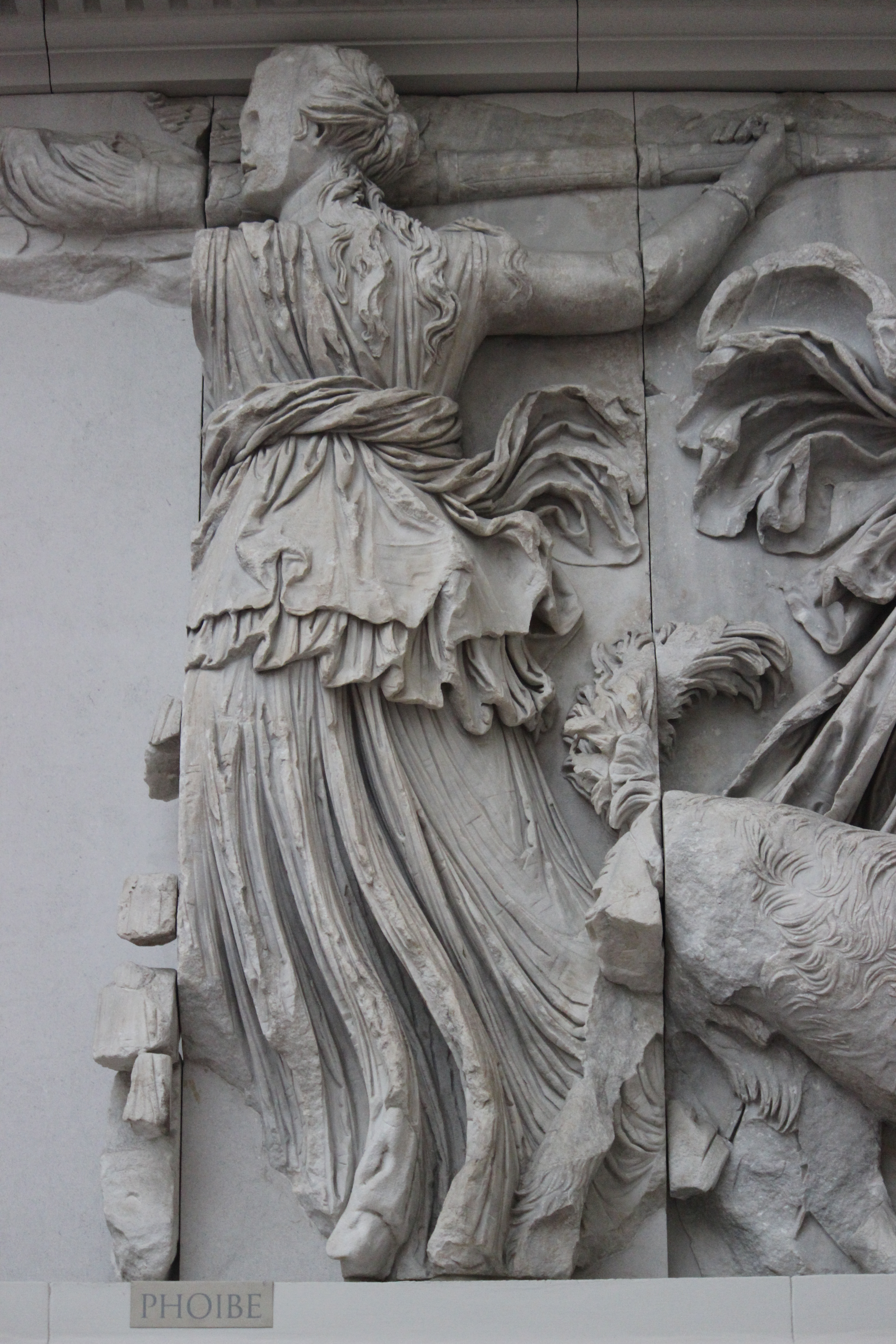 Phoibe lucha contra los gigantes. Altar de Pérgamo.